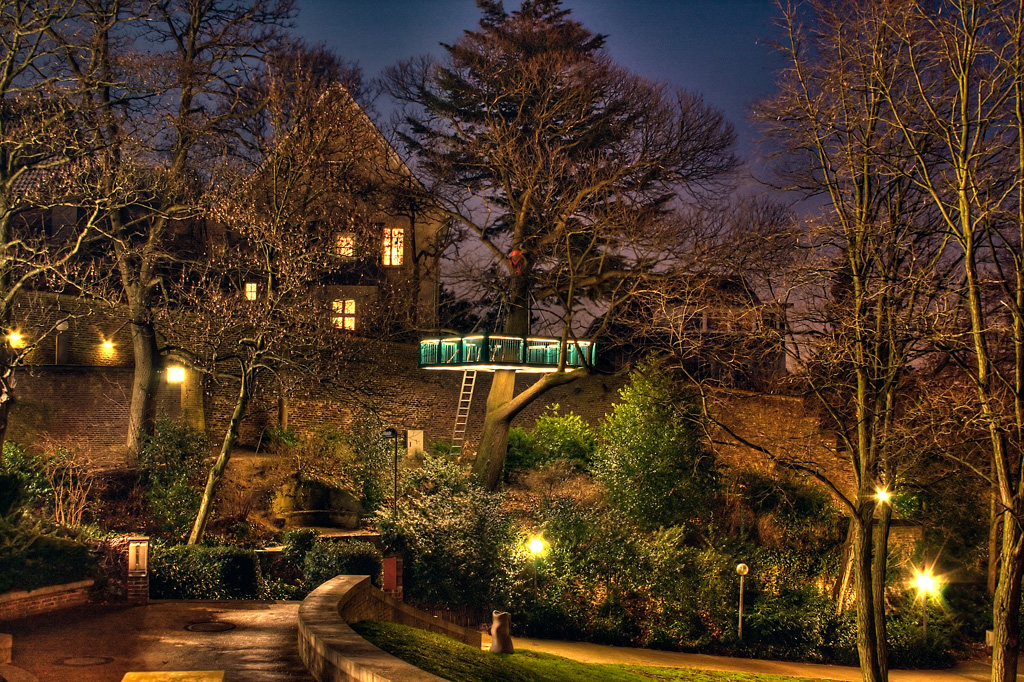 Abteiberg Museum - Garten mit Baumhaus mit Lichtinstallertion